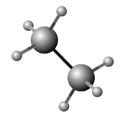 Prostorová geometrie molekuly ethanu